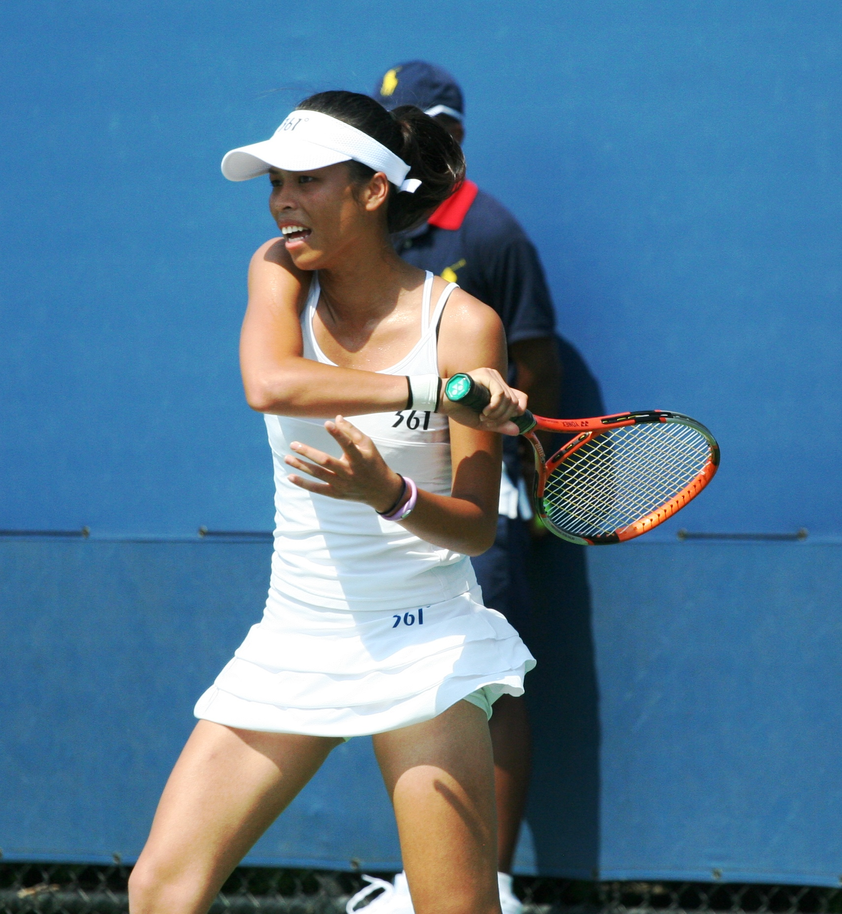 U.S. Open Wednesday, Sept. 1, 2010